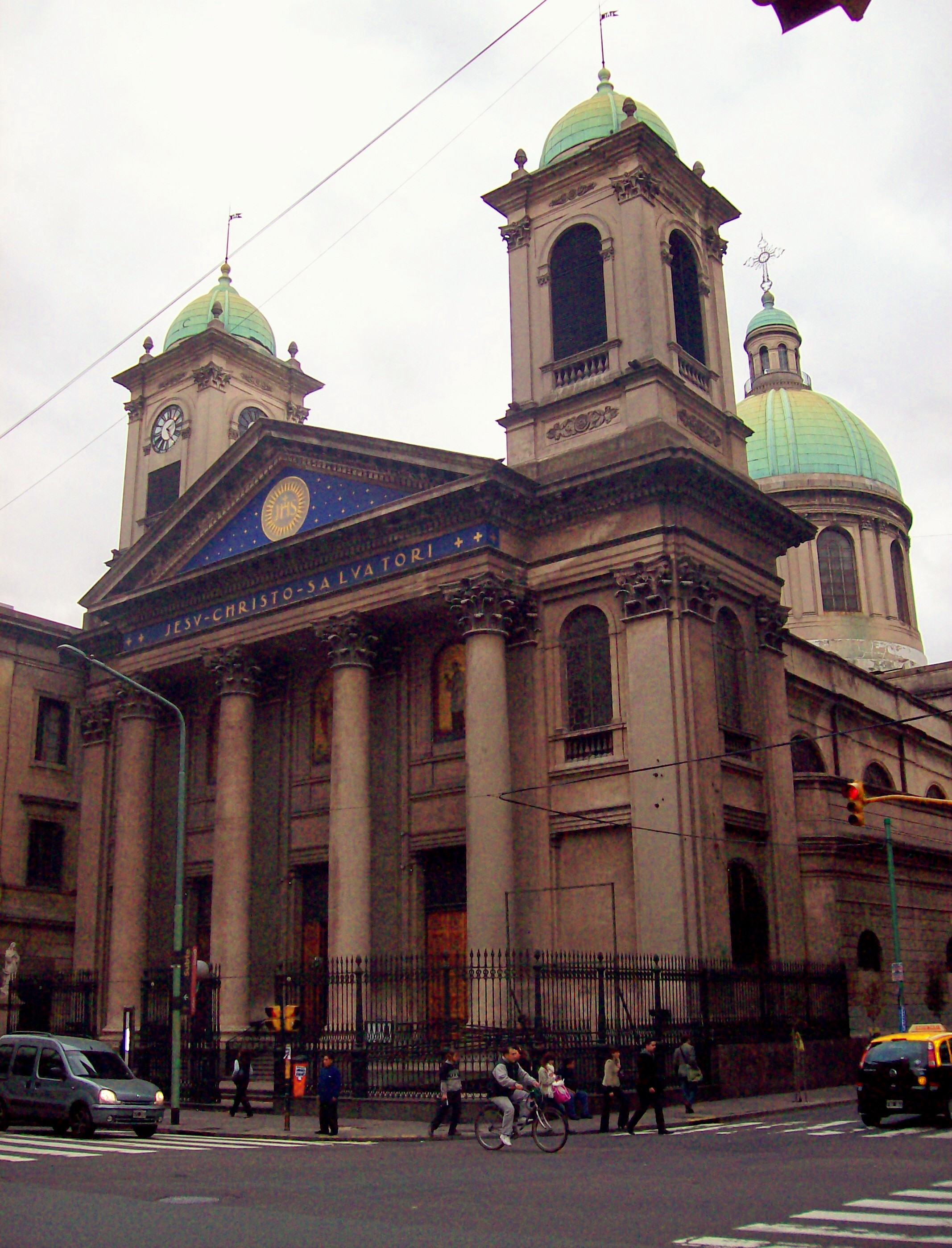 Iglesia del Salvador, Avenida Callao al 500, (esquina SO de Callao y Tucumán) en la Ciudad de Buenos Aires. Foto tomada de la esquina NE a la esq. SO